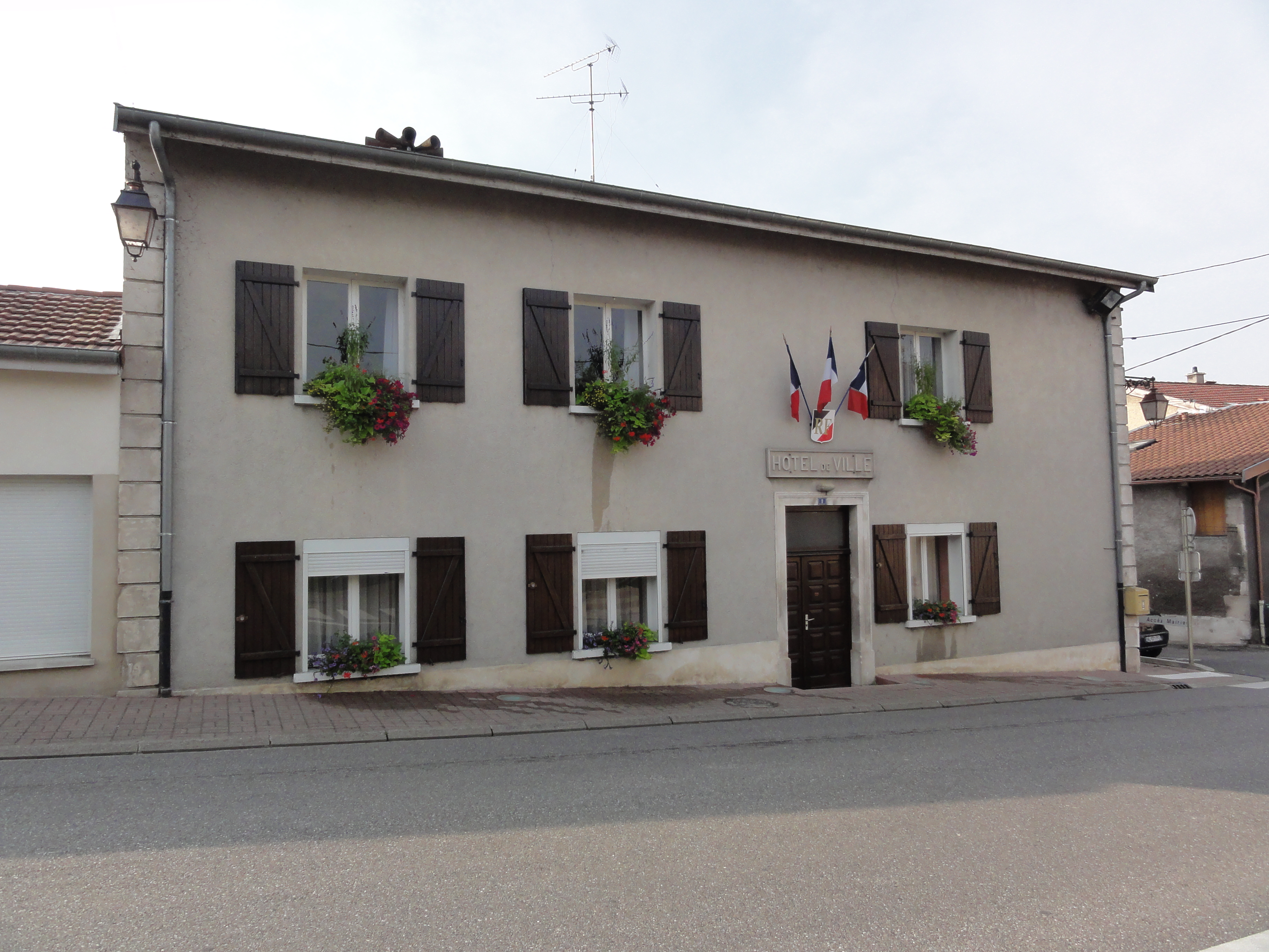 Pagny-sur-Meuse (Meuse) Hôtel de ville